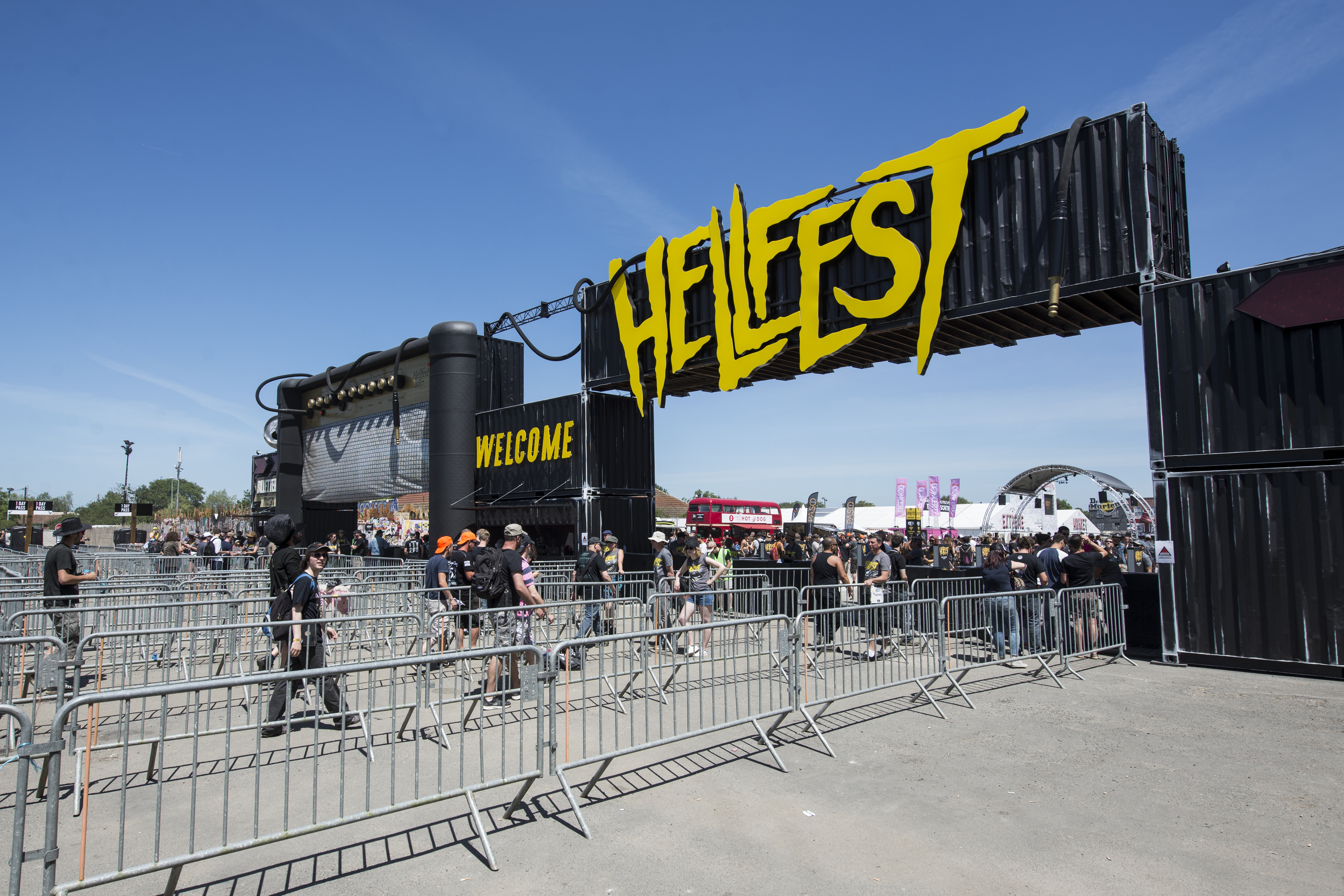 Entrée du Hellfest 2017.